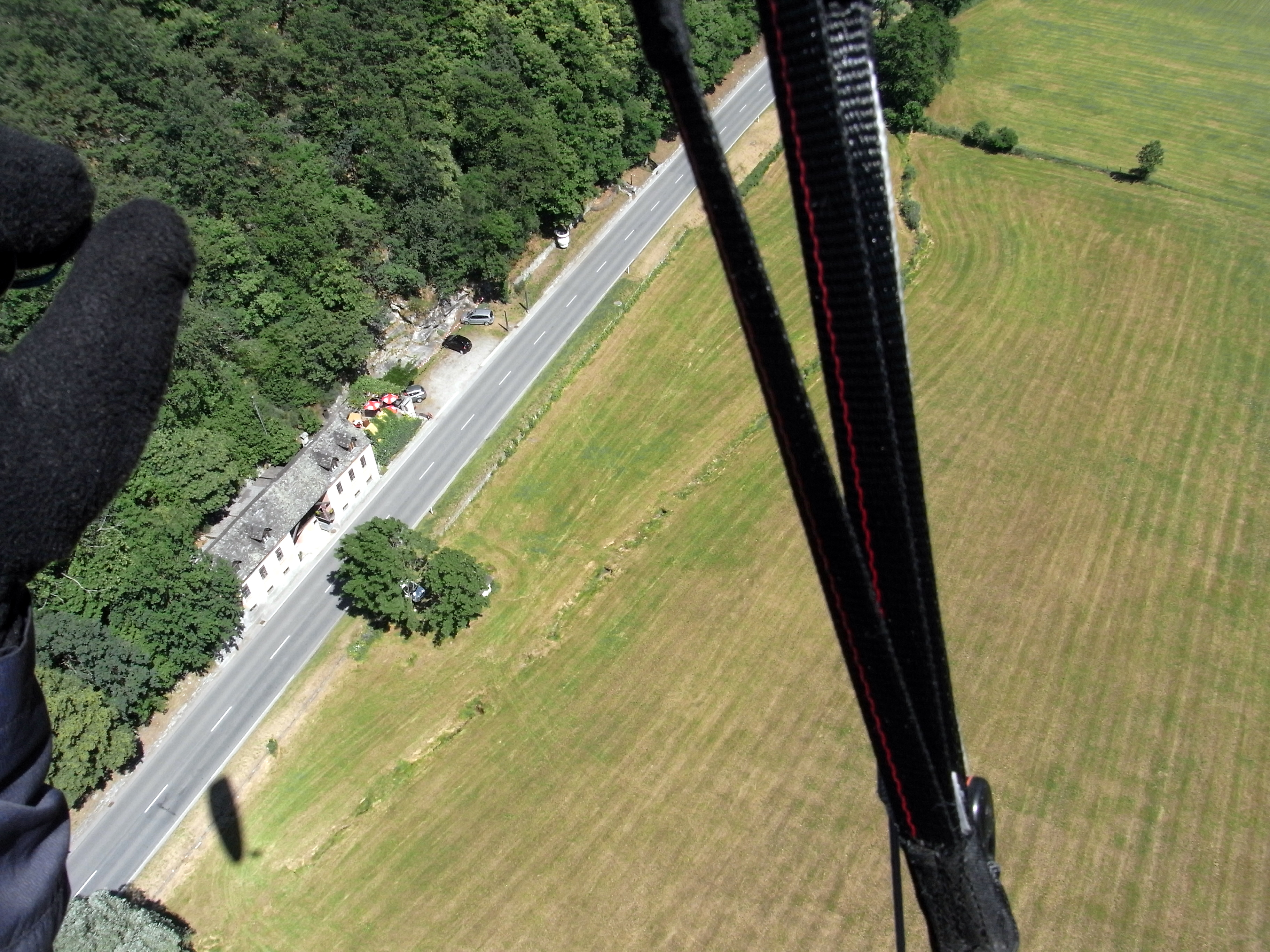 Ronchini